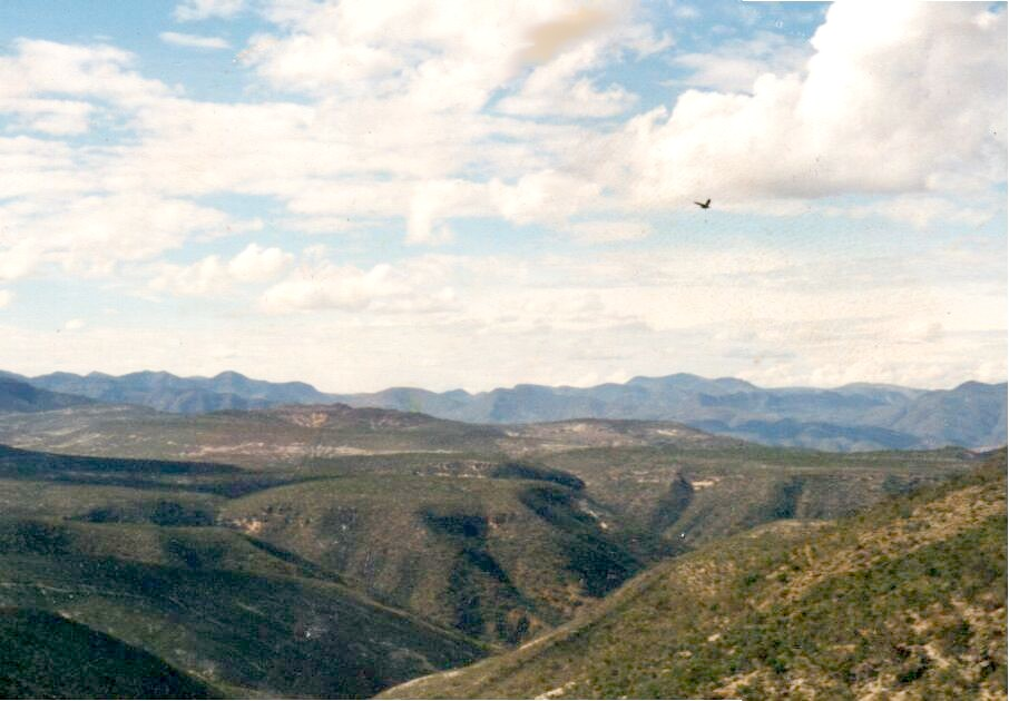 Panorámica de la Sierra Mixteca, a la altura de Nativitas Monte Verde (Oaxaca). Se trata de una de las regiones más pobres de México, tanto en recursos naturales como en monetarios.